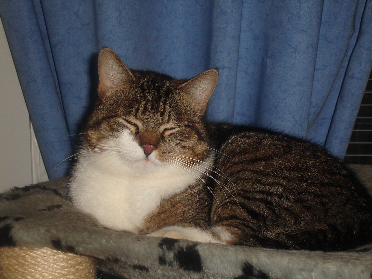 Description: Leevi-cat Source: Own work Date: 2.1.2007 Author: Olen itse luonut tiedoston Permission: Kuva on vapaasti käytettävissä Wikipedia Commonsissa, lukuunottamatta Wikipediaa